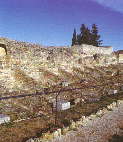 Ninfeo. Ruinas de Valeria